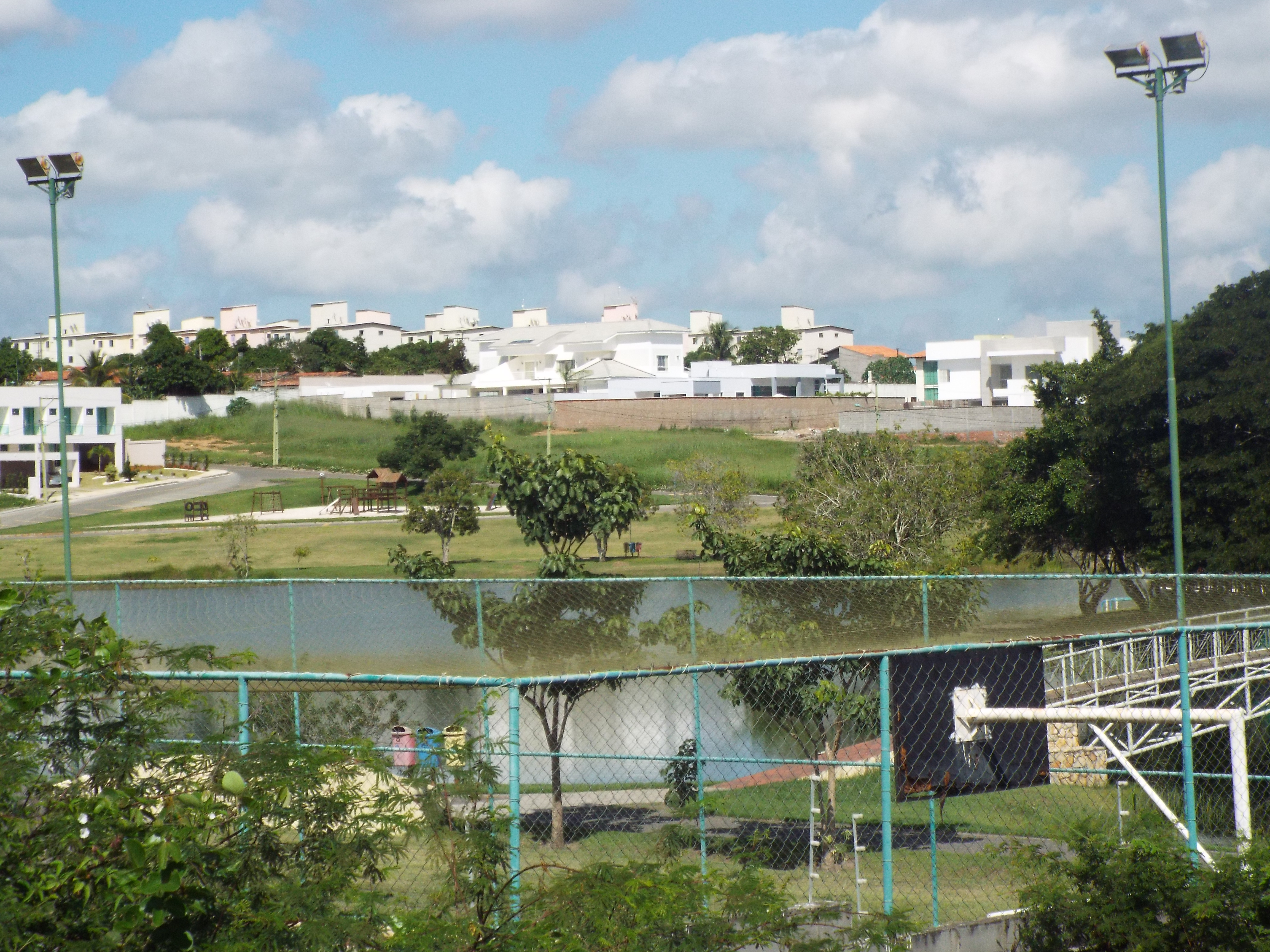 Condomínio de luxo FSA